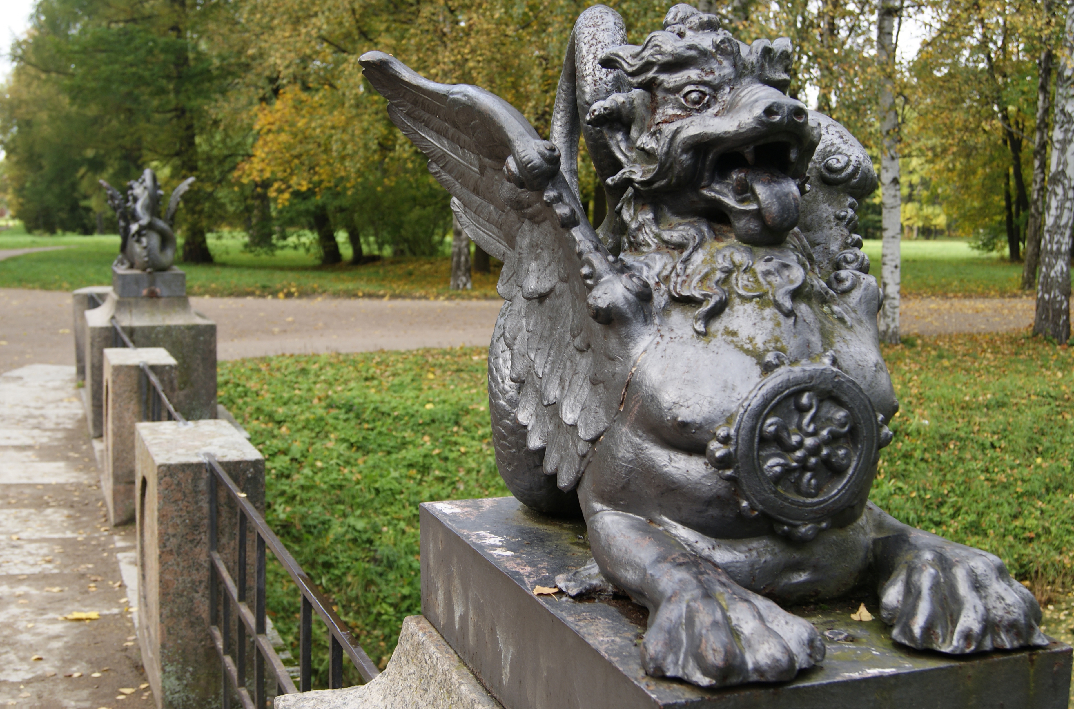 Драконов мост, называвшийся в документах конца XVIII века мостом «с чудовищными фигурами», был построен в 1785 году по проекту Ч. Камерона, неподалеку от Китайского театра.